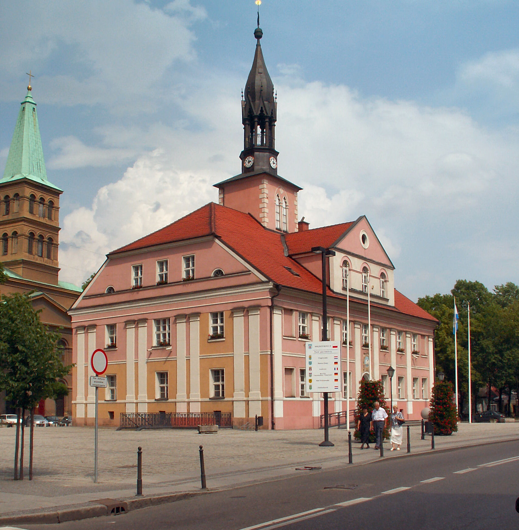 Ratusz w Międzyrzeczu - woj. lubuskie, Poland